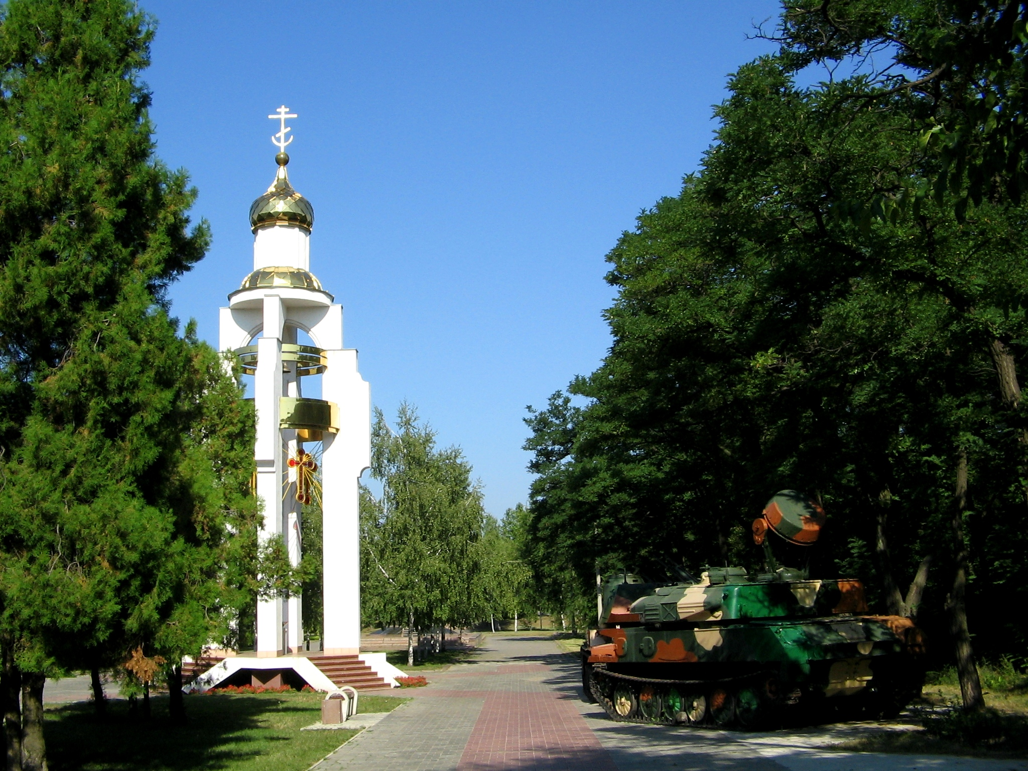 Часовня в парке Победы